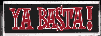 Logo du groupe punk ska Ya Basta!